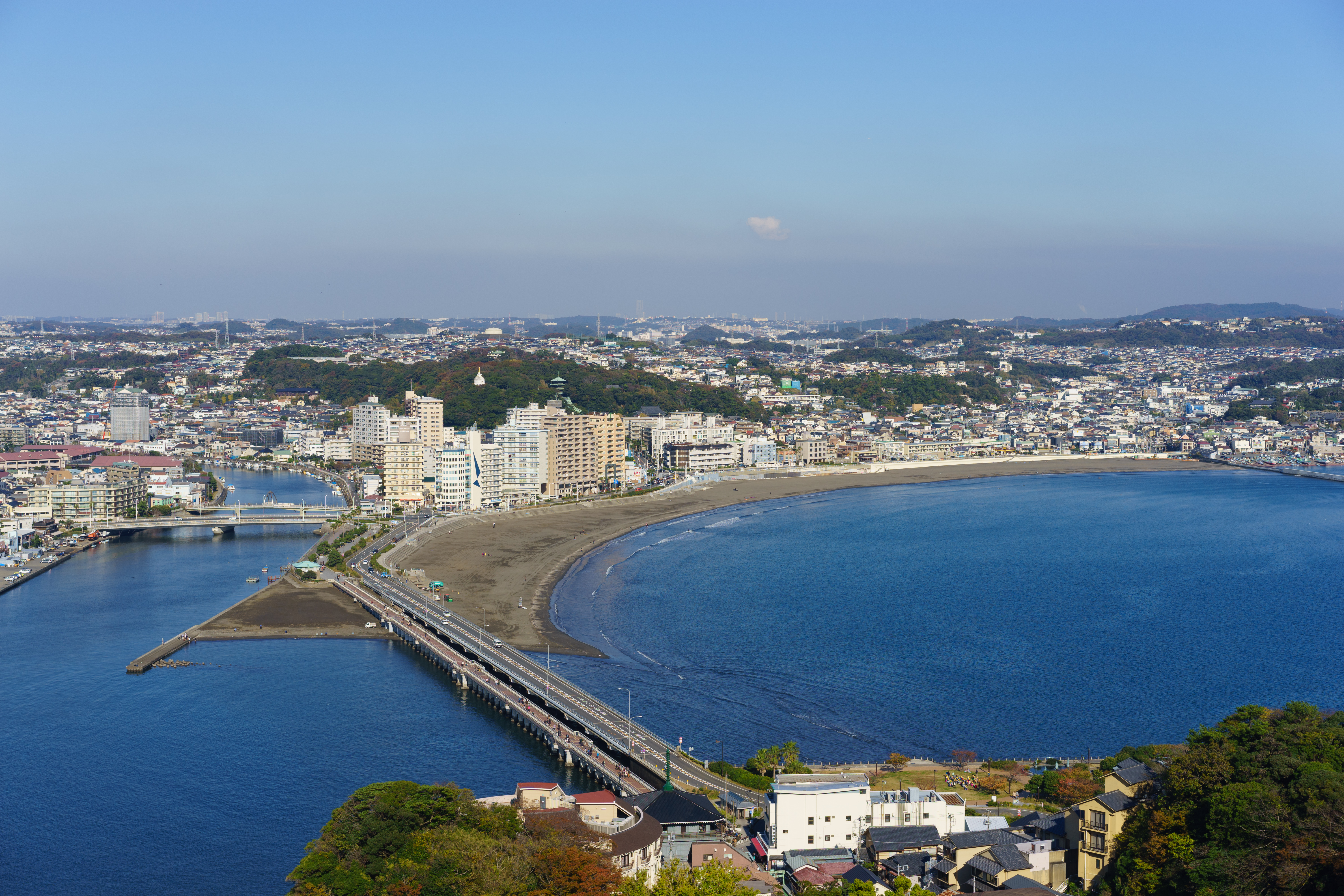 江ノ島 Enoshima, Japan